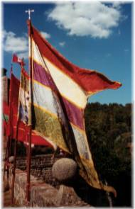 Pendón de Tejerina - Standard (flag) of Tejerina